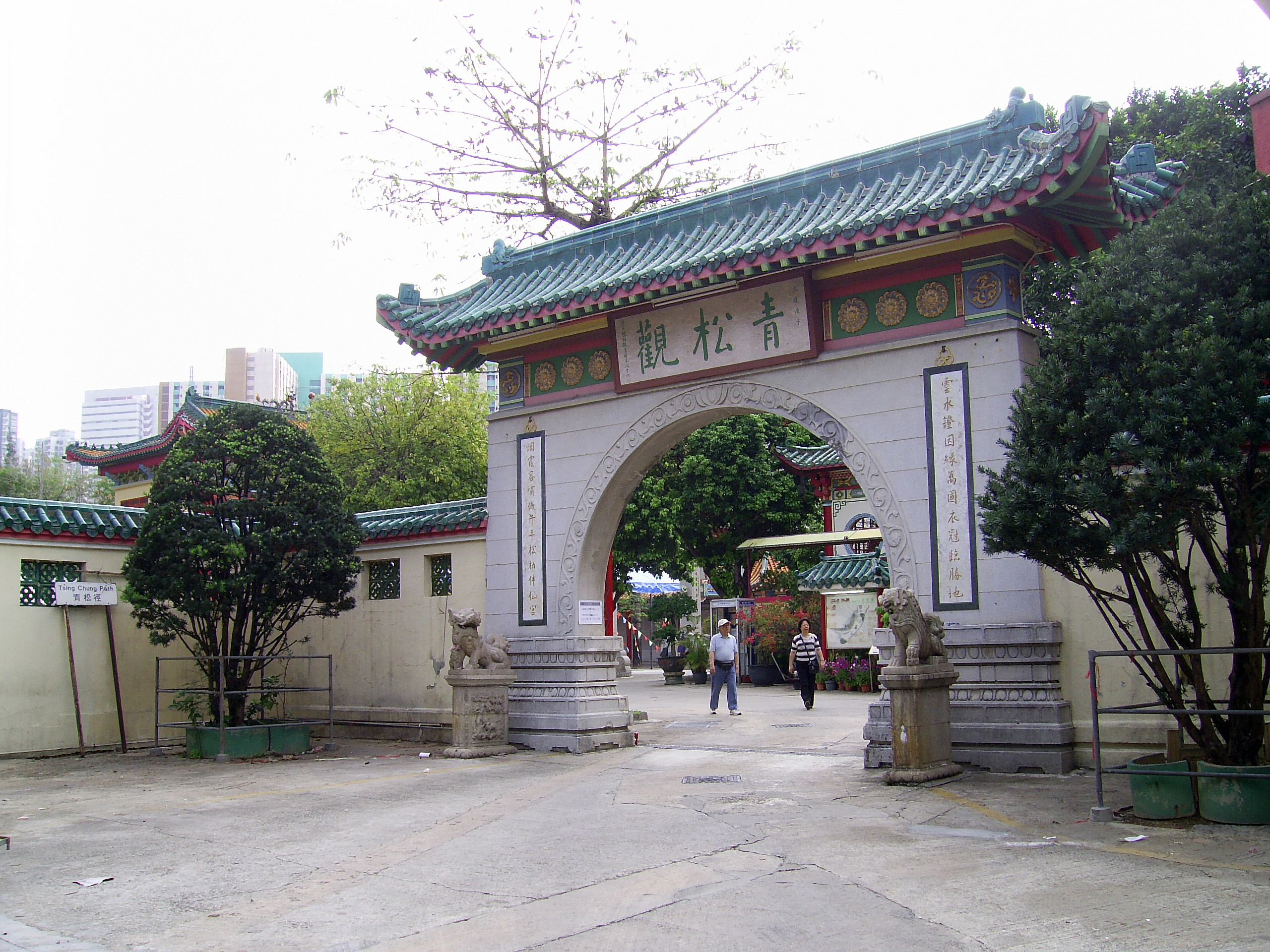 中文（香港）: 青松觀門樓